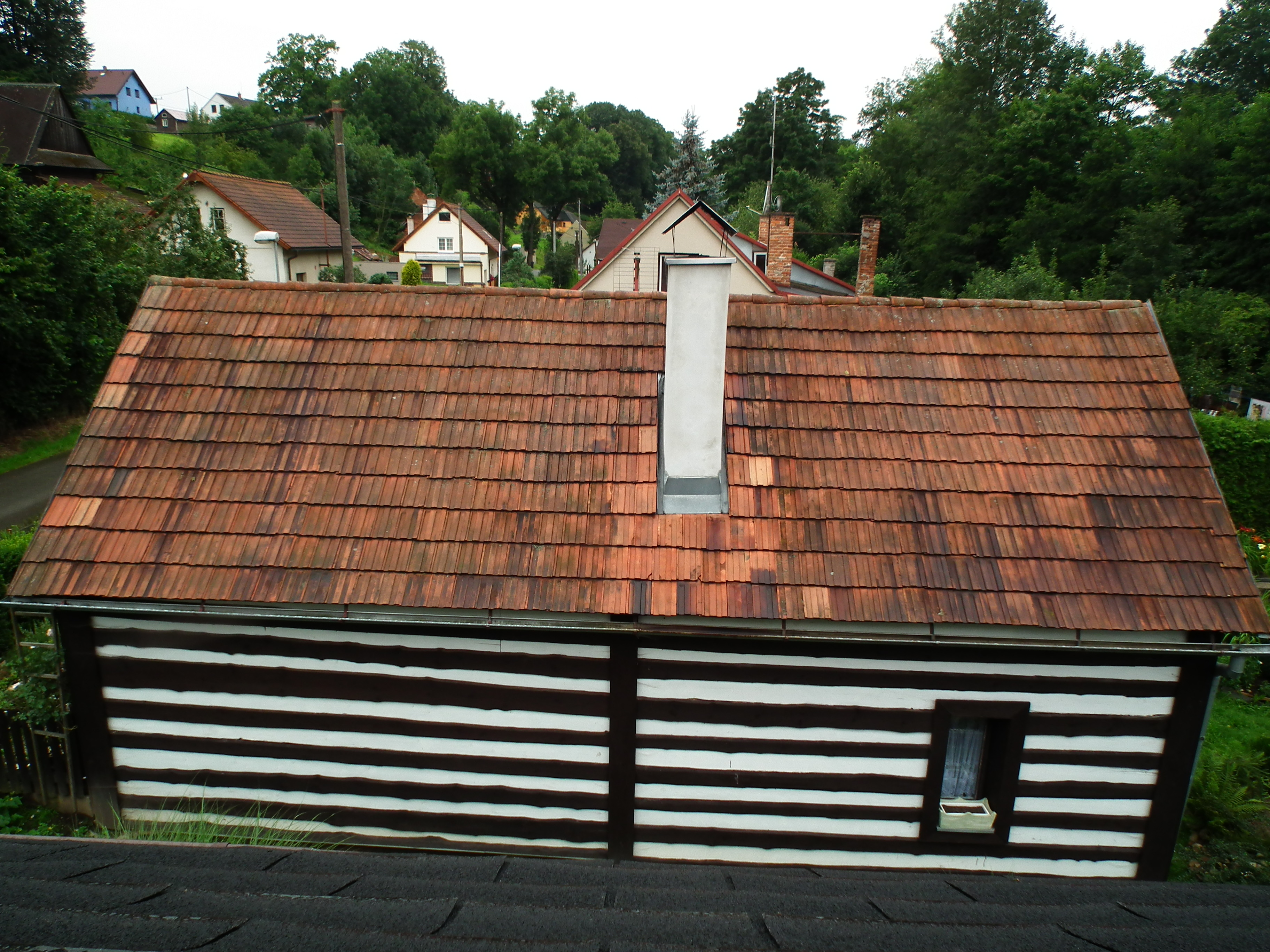 Oldrichovice - część Ujścia nad Orlicą.